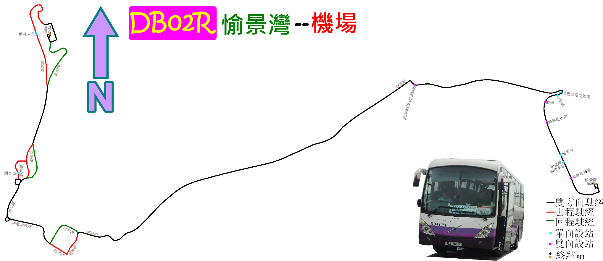 中文（香港）: 愉景灣巴士DB02R線的走線圖